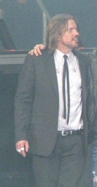 Guns n´Roses Poliedro de Caracas 27 de Marzo 2010